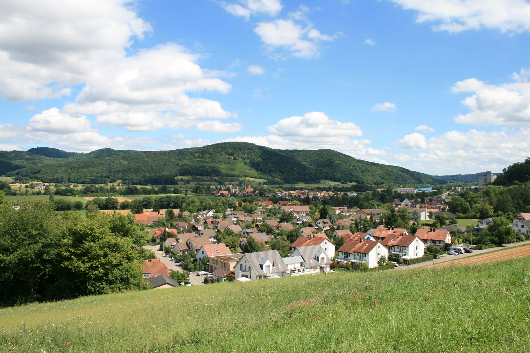 Rekingen AG, Schweiz im Hintergrund auf der anderen Seite des Rheins Reckingen, Baden